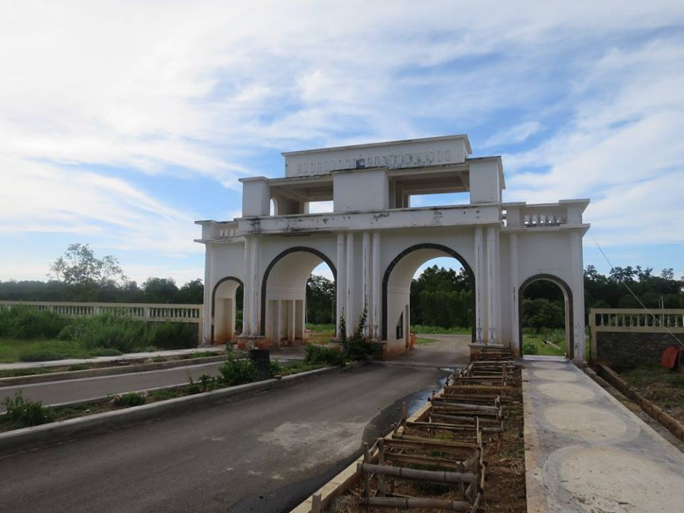 Jardim dos Heróis e Martires da Pátria em Metinaro